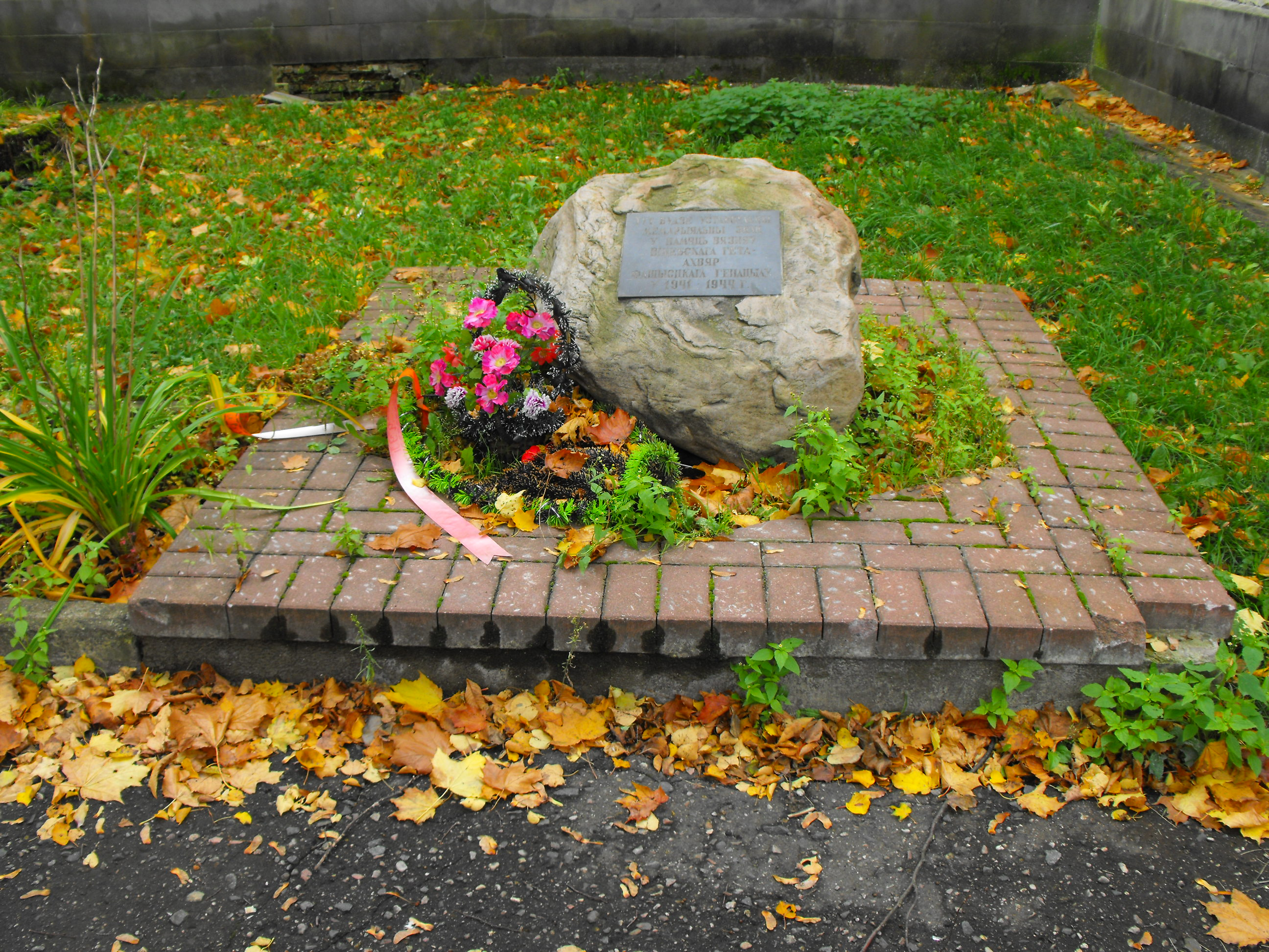 Памятный знак на территории бывшего гетто в Витебске в 1941 году. На его месте предполагается установить памятник витебским евреям, погибшим в гетто.